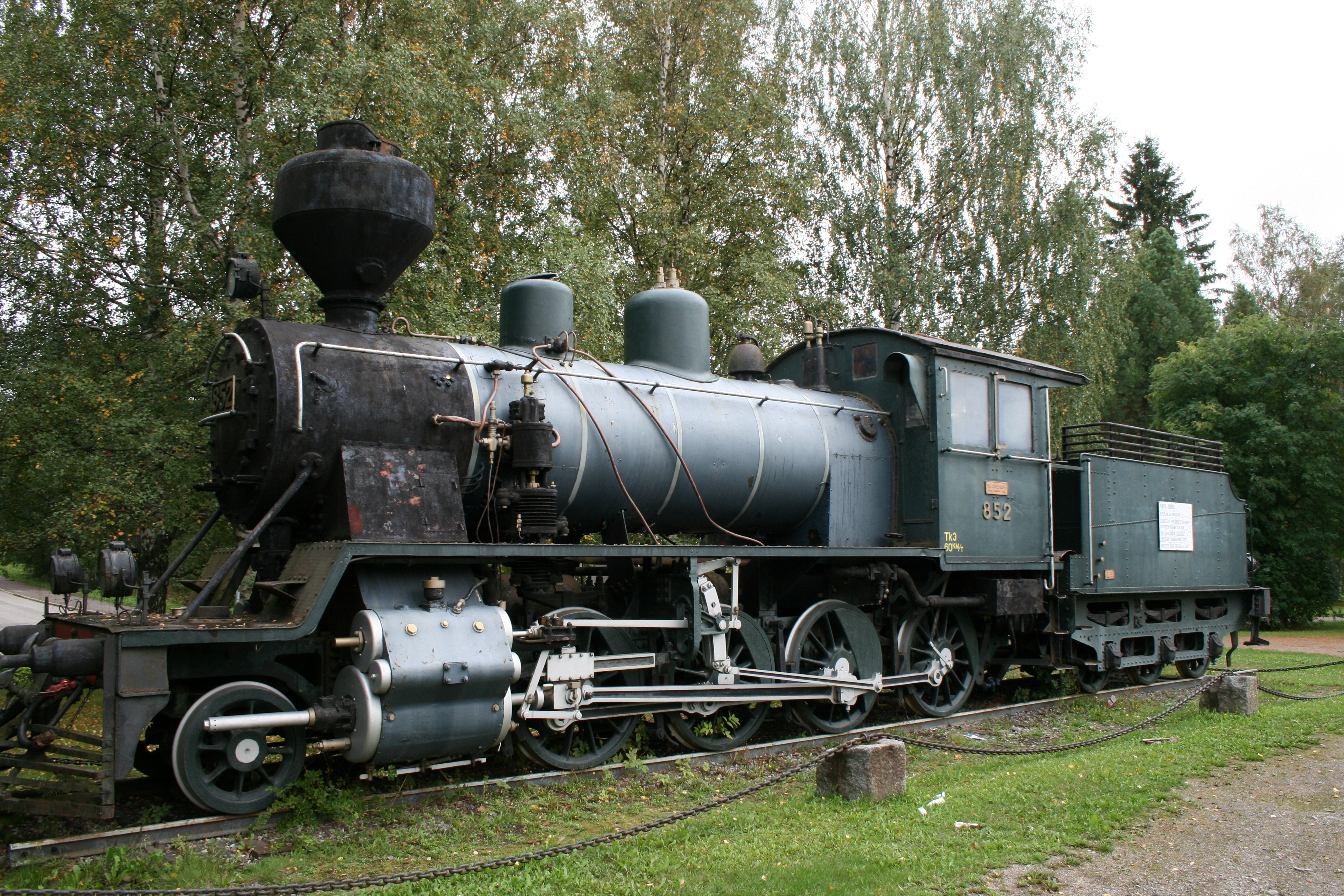 Savon radan museo: höyryveturi Tk3 (”Pikku-Jumbo”) numero 852 vuodelta 1929.